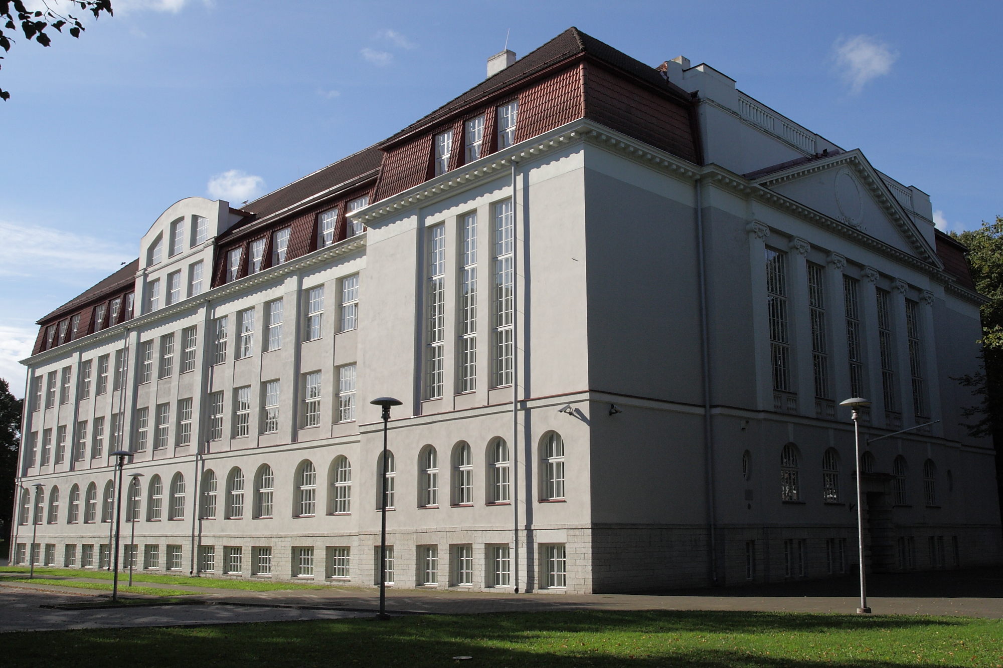 Tallinn, koolihoone Raua 6, 1923